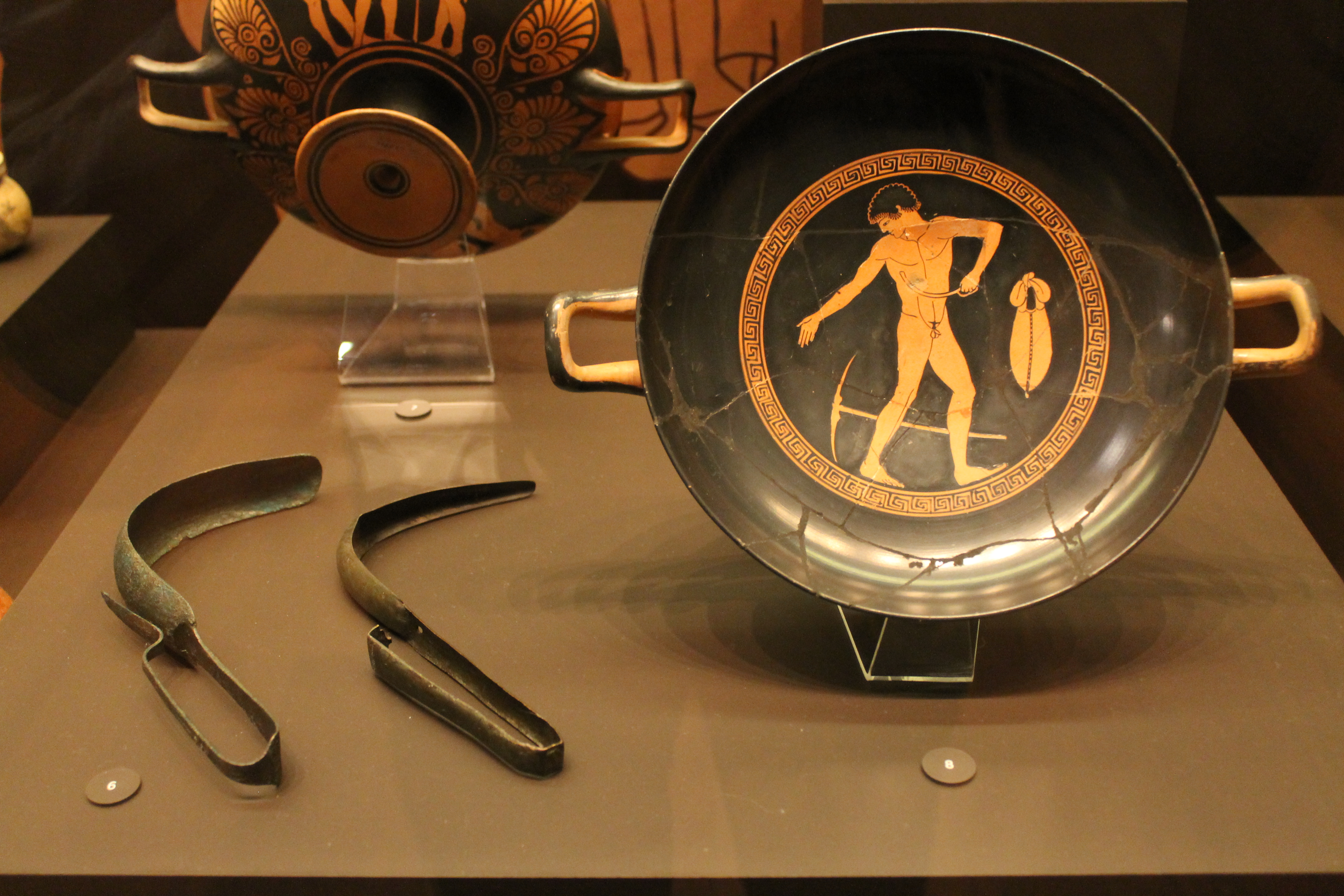 Estrígil griego. Kílix con un atleta limpiándose el cuerpo con un estrígil. Pintor de Antifón. 490-480 a. C. Museo Arqueológico Nacional de España.